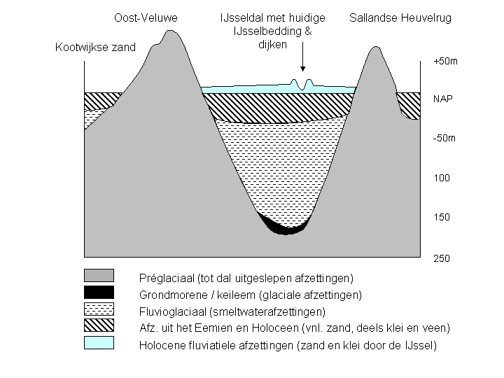 Eigengemaakte media. Dwarsdoorsnede IJsseldal